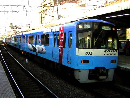 京急新1000形、2005年に突如青く塗り替えられ、羽田空港第2ターミナル開業をPRした。京急蒲田駅にて。